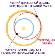 Russian translate - Illustration of Hohmann transfer orbit Полёт к Марсу: переходная орбита Гомана — Ветчинкина